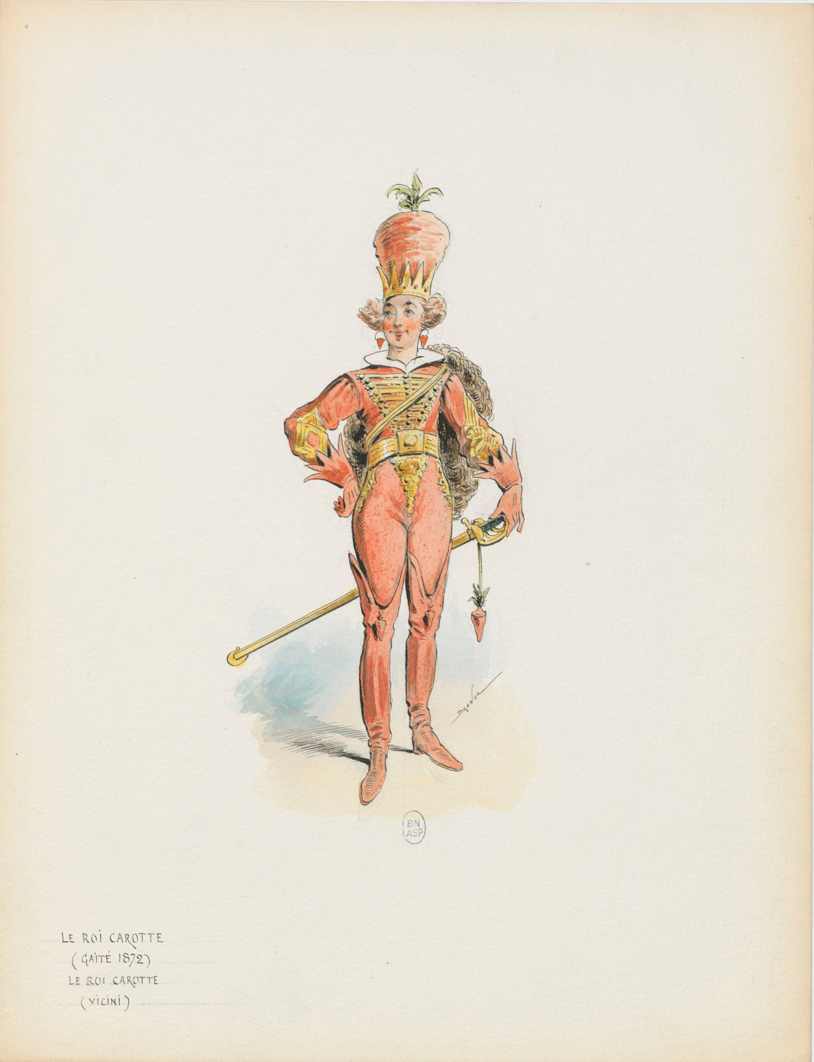 Un personnage vêtu de orange et jaune en pied, content de lui, se tient face à l’observateur. Le poing droit à la hanche, son autre main repose sur un sabre qui lui bat les talons. Cette arme est rendue ridicule car au pommeau pend un gland sous forme de carotte. Ce même légume pend à chacune de ses cuissardes et en boucles d’oreille. La couronne témoigne du titre et elle ceint une incroyable mitre faite d’une très haute carotte.